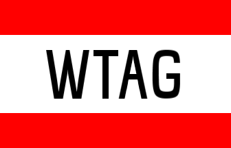 Flagge und Logo der Westfälische Transport AG (WTAG)